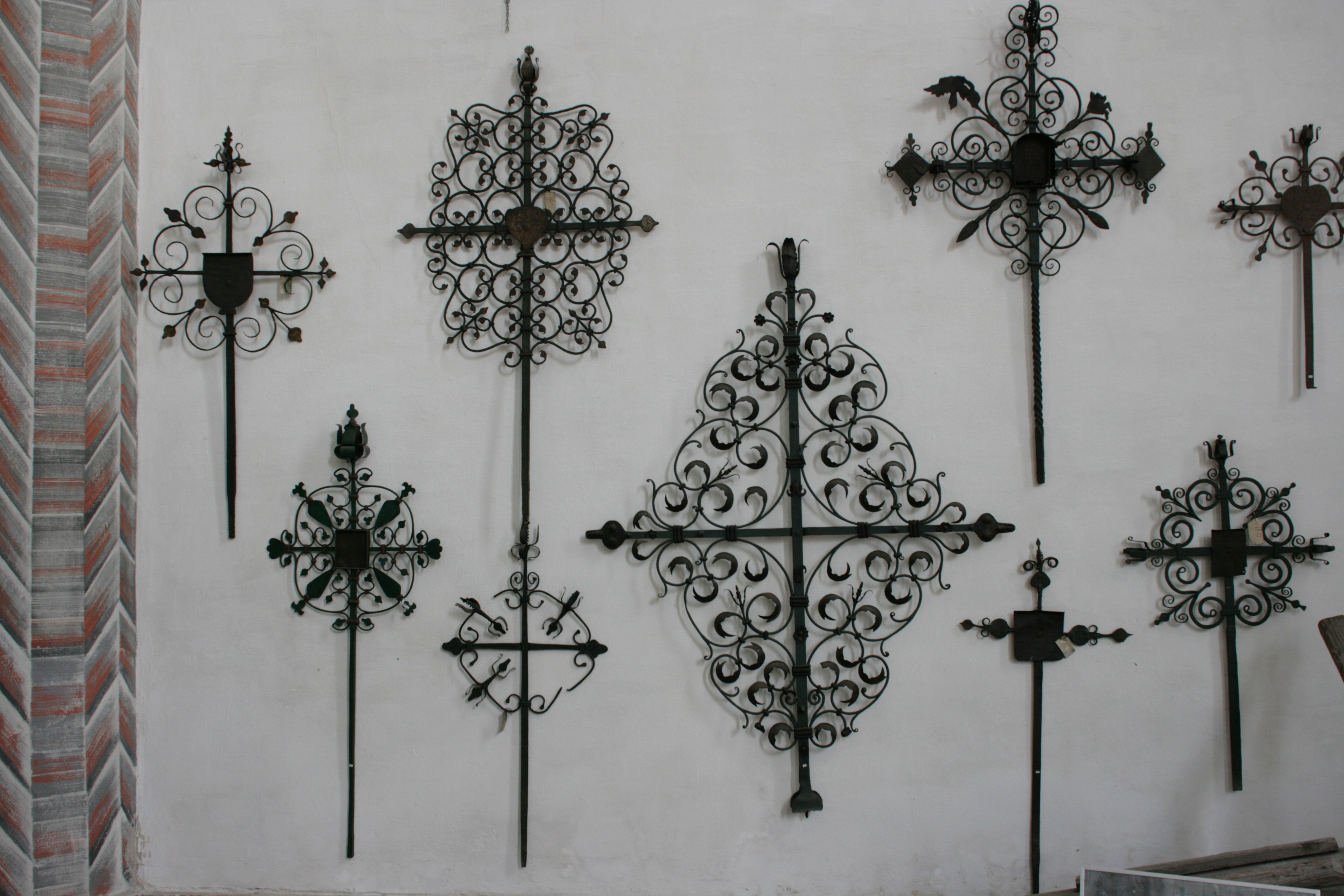 Nikolaikirche, Bogstraße in Görlitz